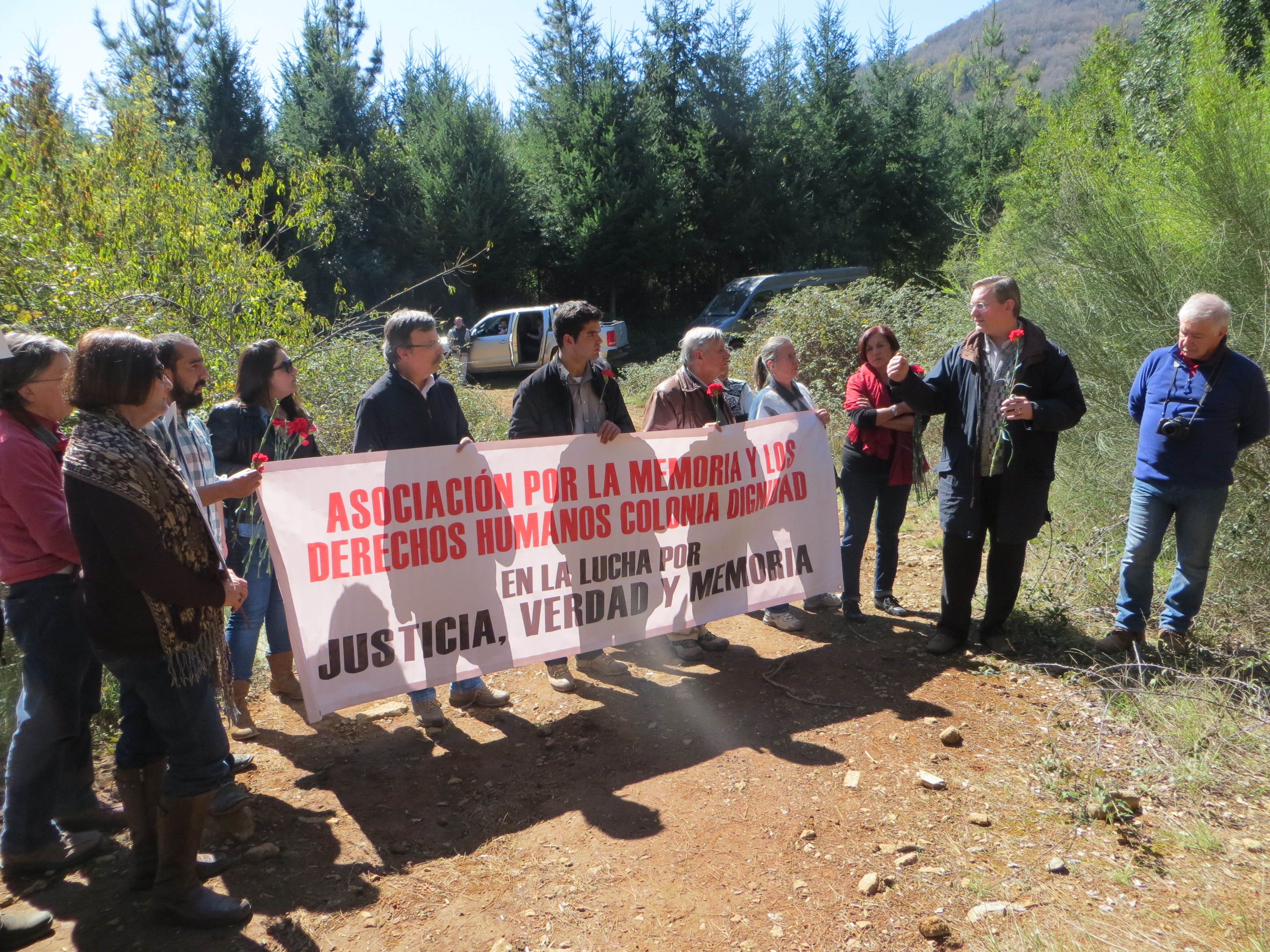 Integrantes de la Asociación por la Memoria y los Derechos Humanos Colonia Dignidad hicieron un homenaje en las fosas donde fueron inhumados y exhumados ilegalmente los cuerpos de los detenidos desaparecidos en Colonia Dignidad durante la dictadura de Augusto Pinochet en Chile.